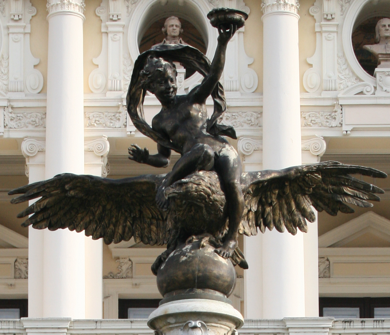 Autorom bronzovej plastiky z roku 1988 je V. Tilgner. Zobrazuje Ganymedesa ako je unášany Diom, ktorý sa prevtelil do podoby orla